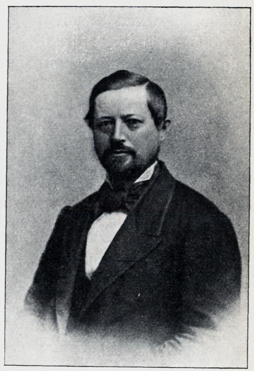 Illustrasjon hentet fra boken "En Christianiensers Erindringer fra 1850- og 60-Aarene" av Nielsen, Yngvar og utgitt av Gyldendal (Kristiania, 1910) Depicted person: Volrath Vogt